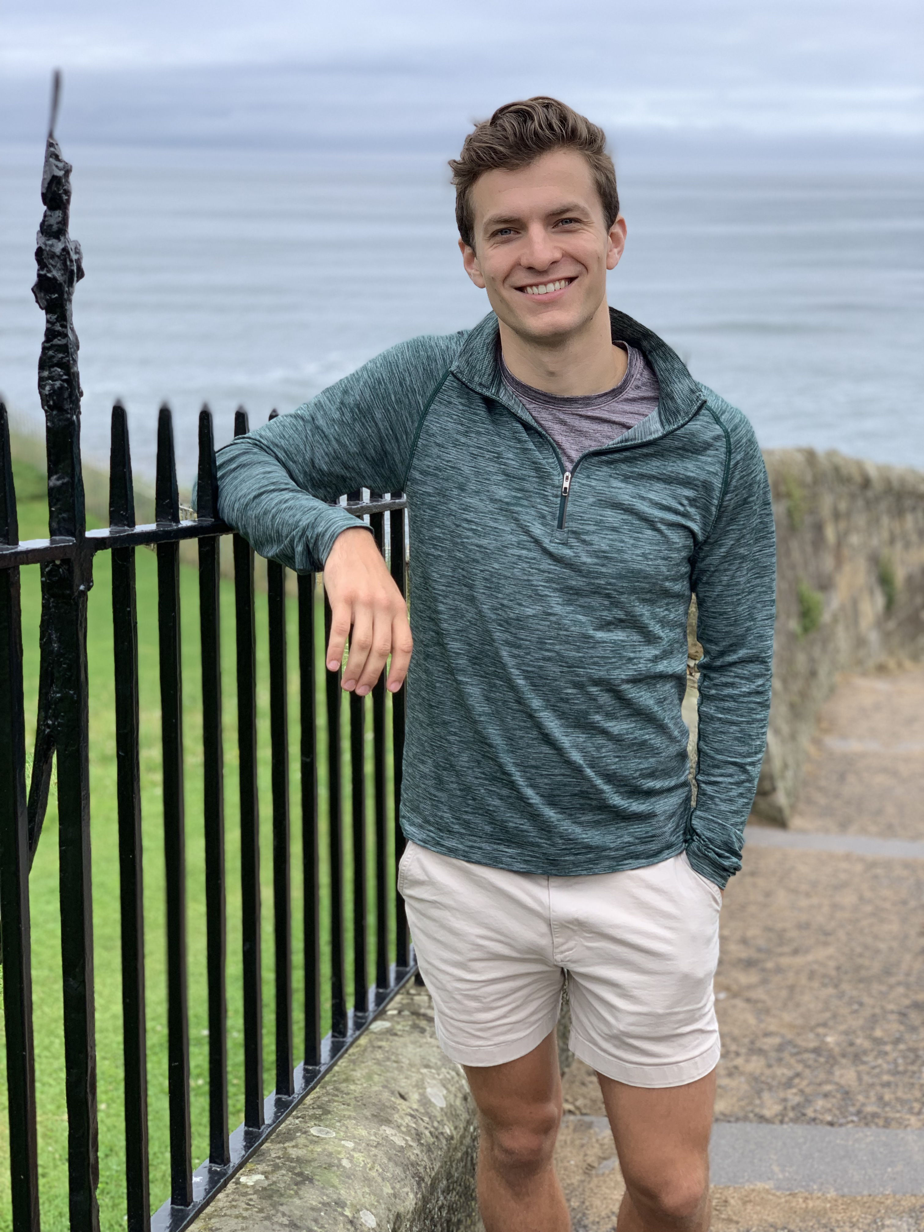 Cason Crane Cason Crane